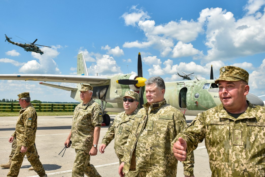 Робоча поїздка до Харківської області.